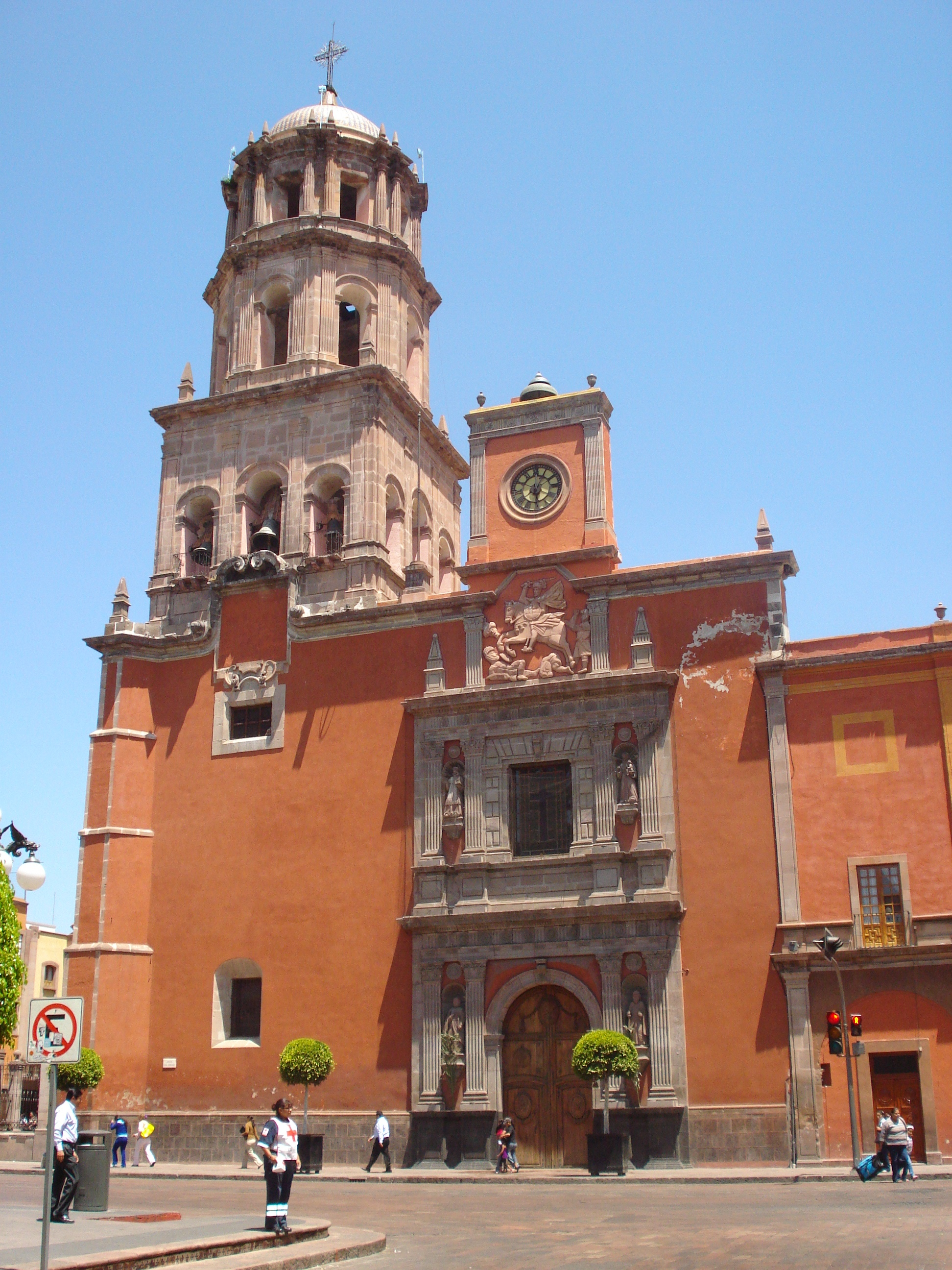 Iglesia de San Francisco en la ciudad de Santiago de Querétaro.